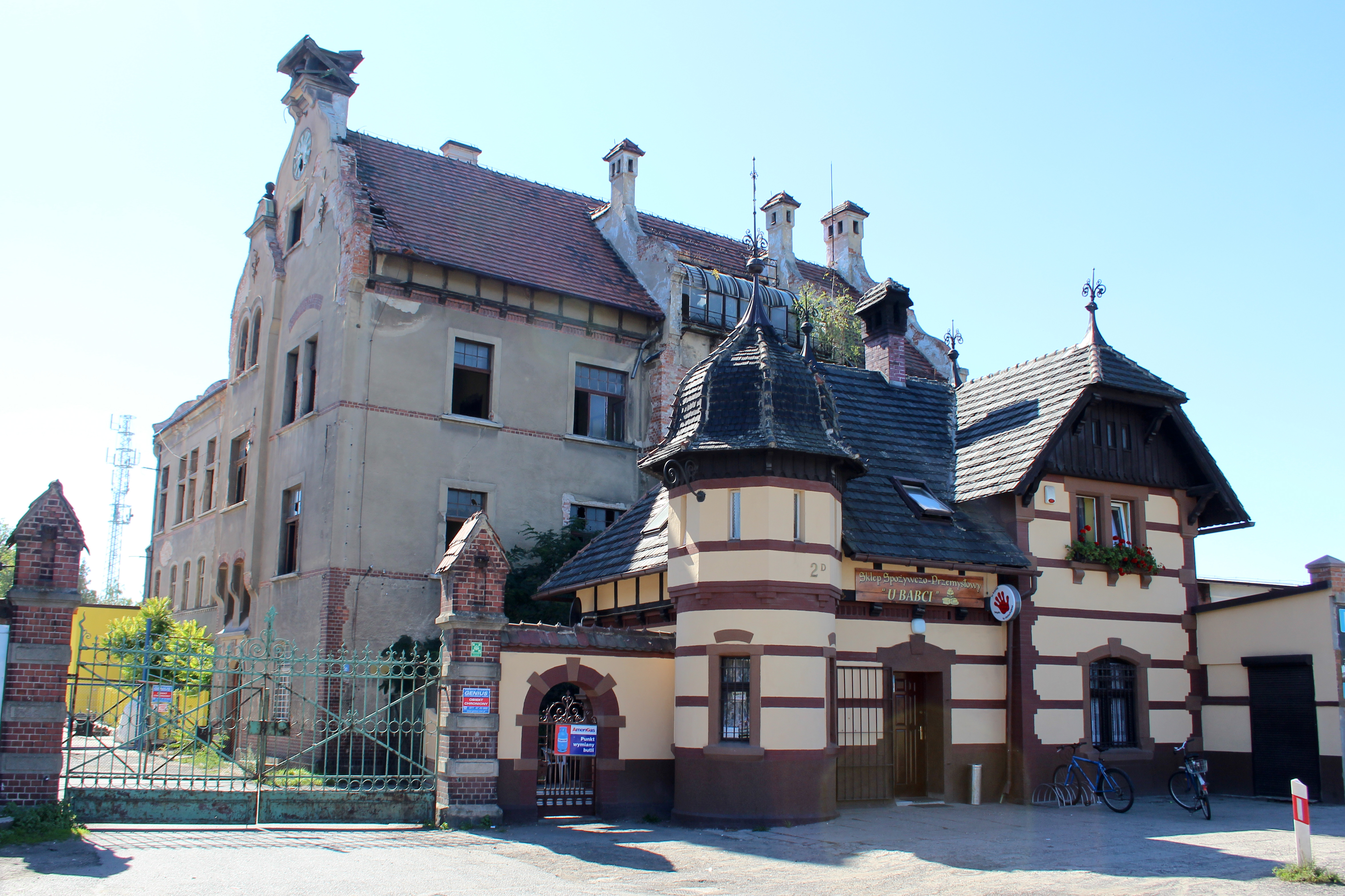 Tułowice - wieś w Polsce w województwie opolskim, w powiecie opolskim w gminie Tułowice.